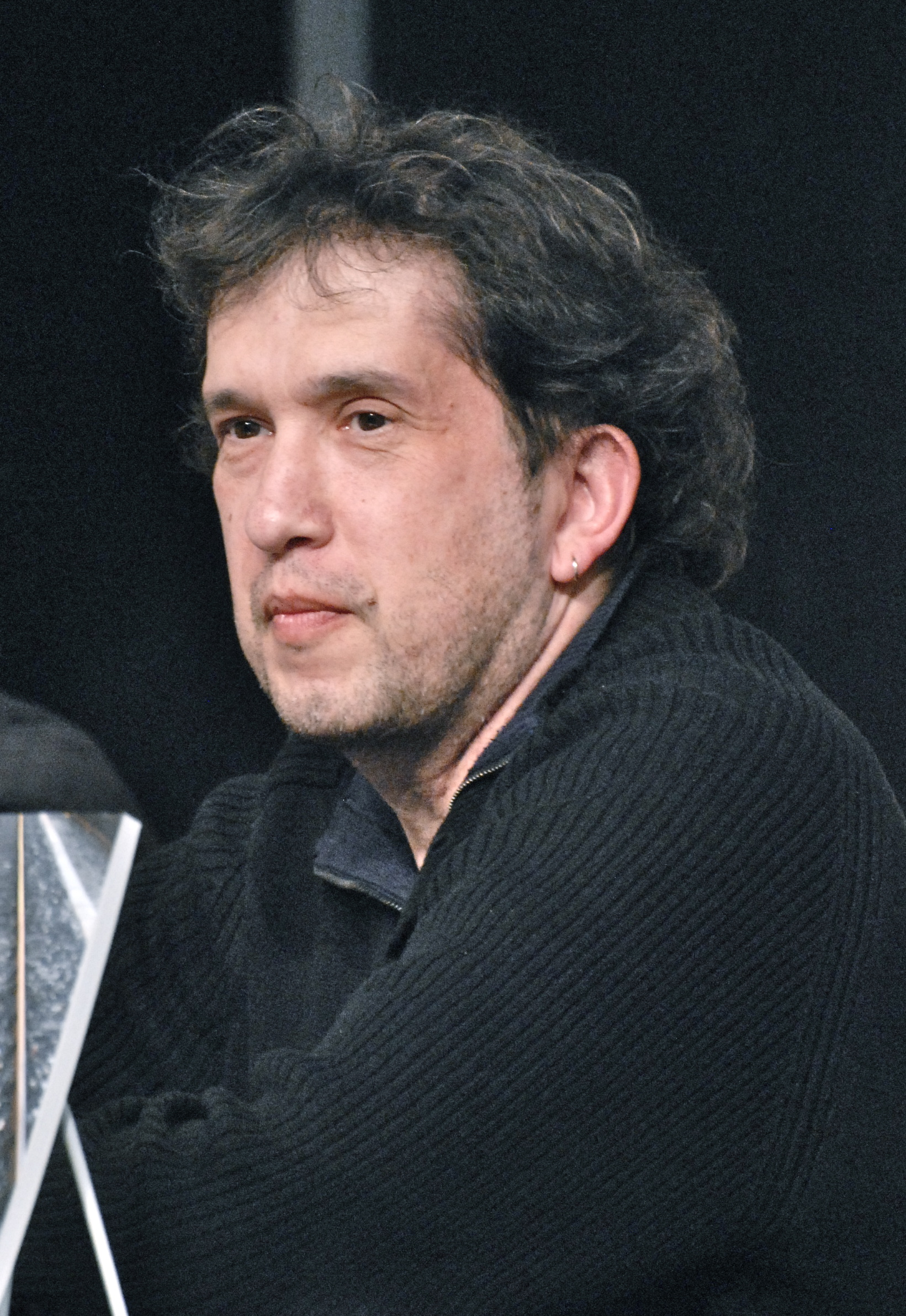 Joan-Lluís Lluís, lors du Salon international du livre de Québec 2012